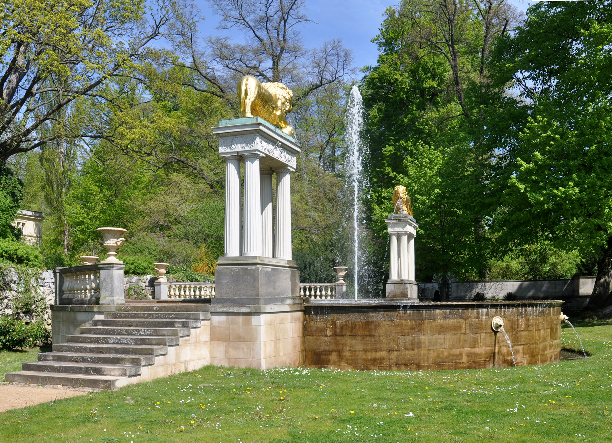 Park Klein-Glienicke, Löwenfontäne von Südwest